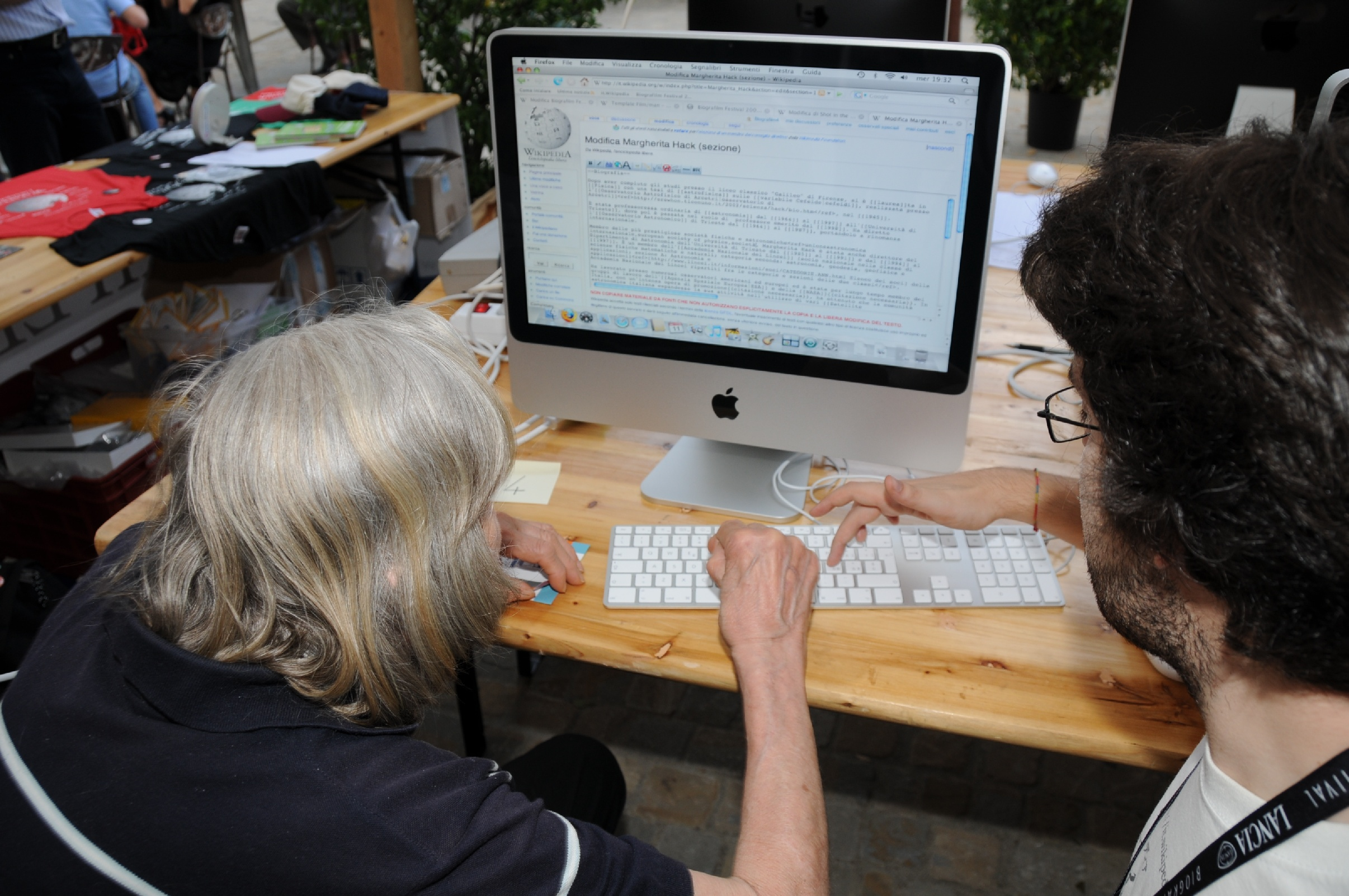 Biografilm 2008 - Bologna